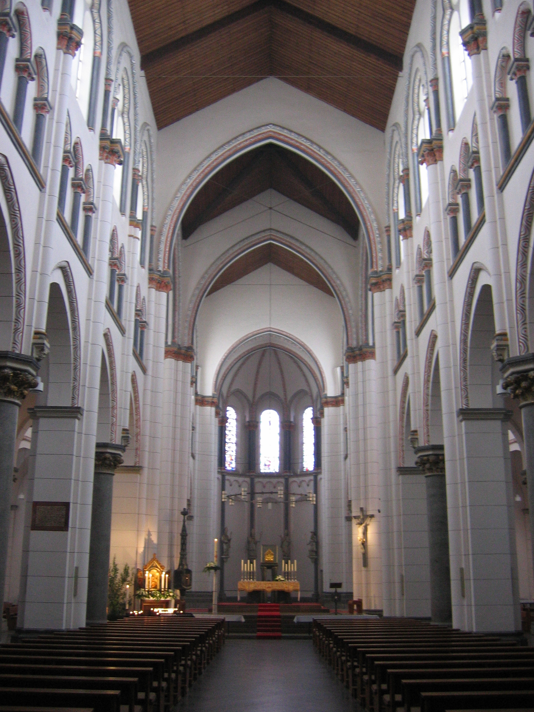 Inennraum der St.-Heribert-Kirche in Köln-Deutz